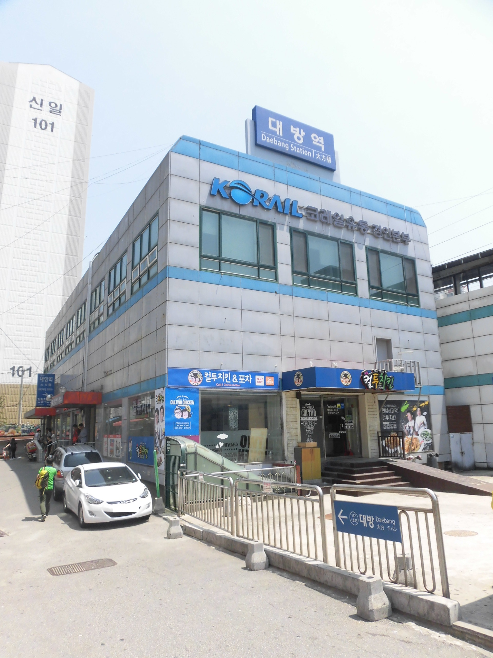 경부선 대방역